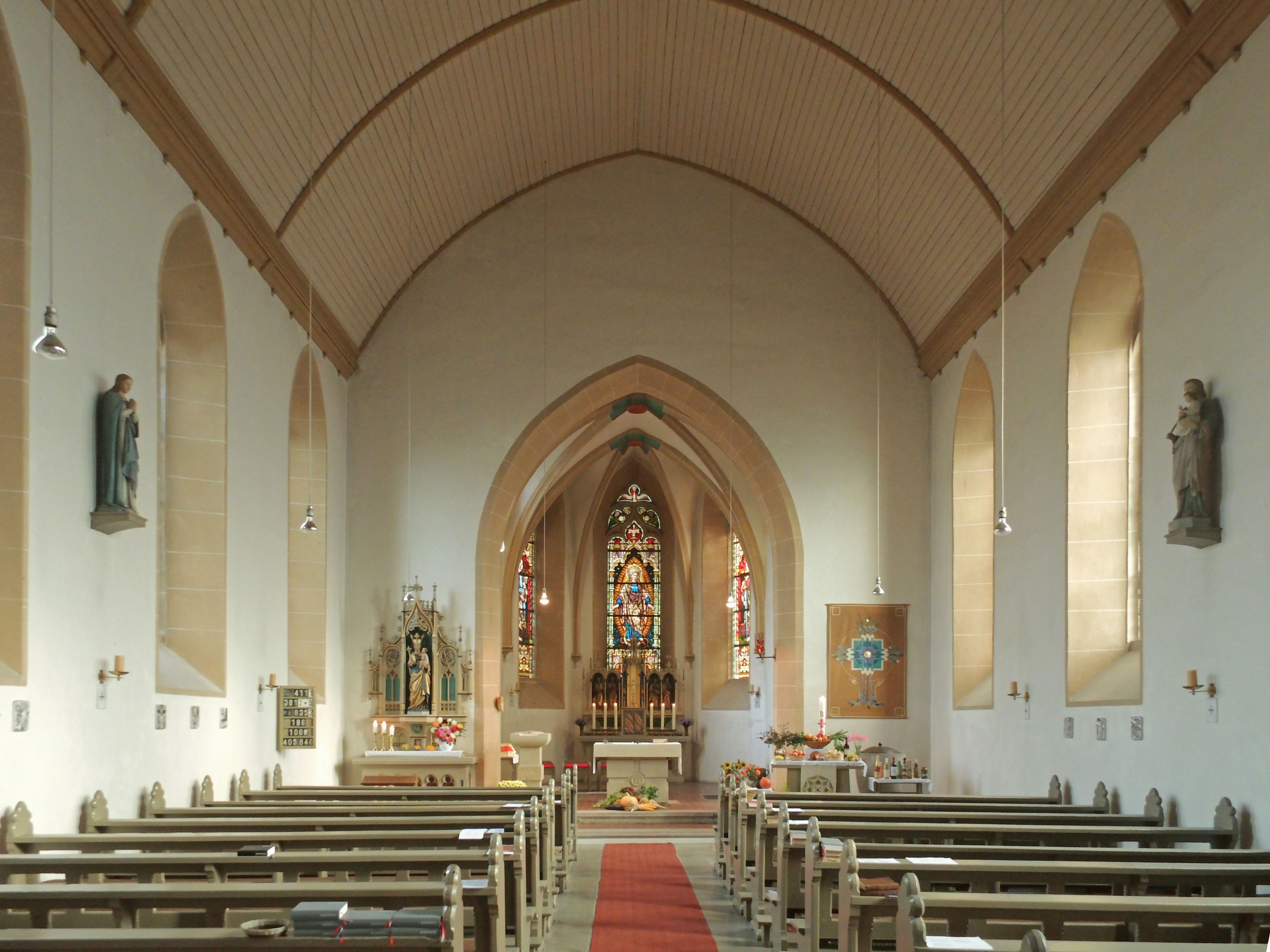 Katholische Kirche in Klein Oschersleben, Blick zum Altarraum